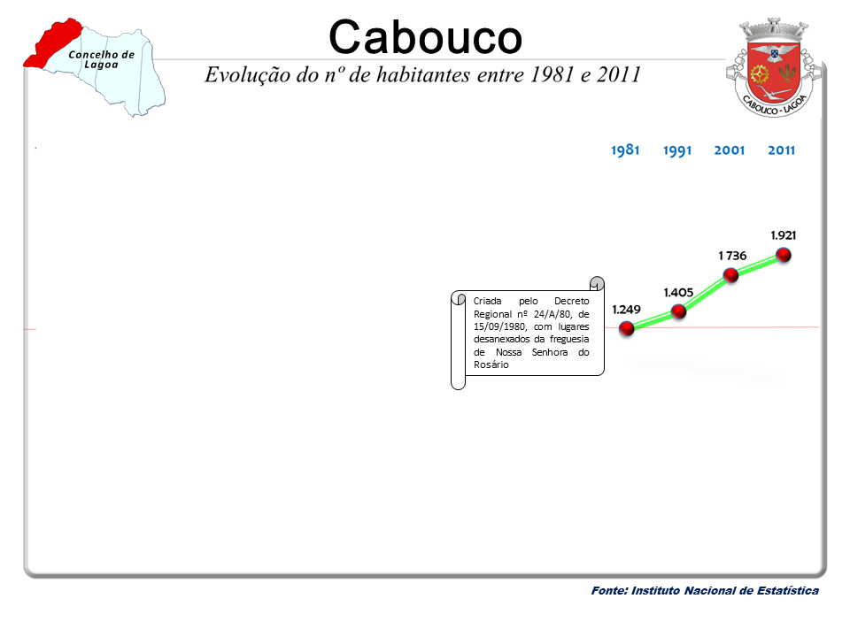 População